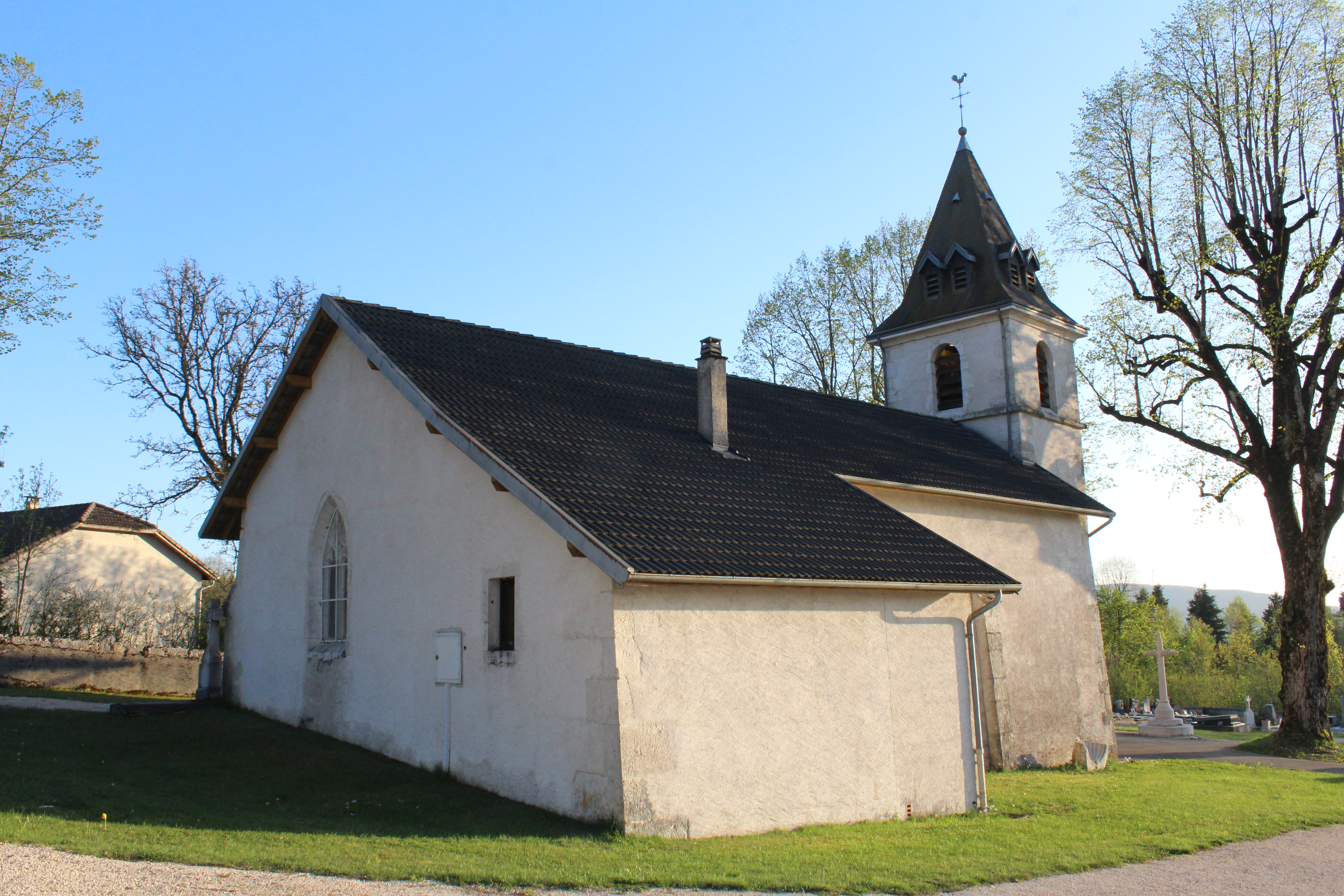 Église Saint-Théodule de Chevillard, Ain.